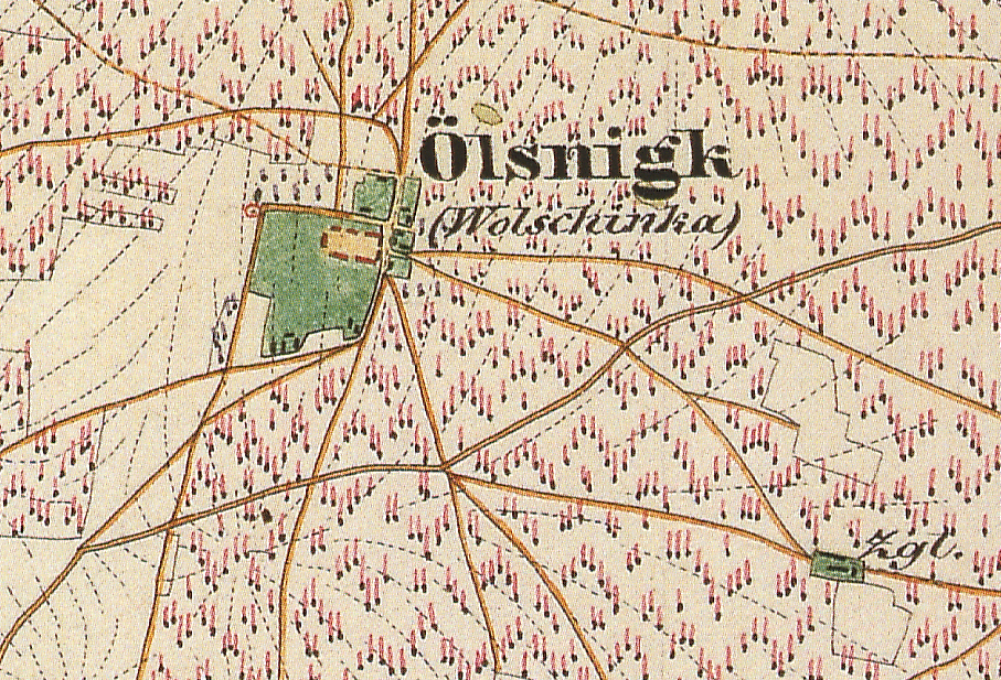 Oelsnig, Wohnplatz von Schorbus, Ortsteil der Stadt Drebkau, Landkreis Spree-Neiße, Brandenburg, Ausschnitt aus dem Urmesstischblatt 4351 Drebkau von 1846